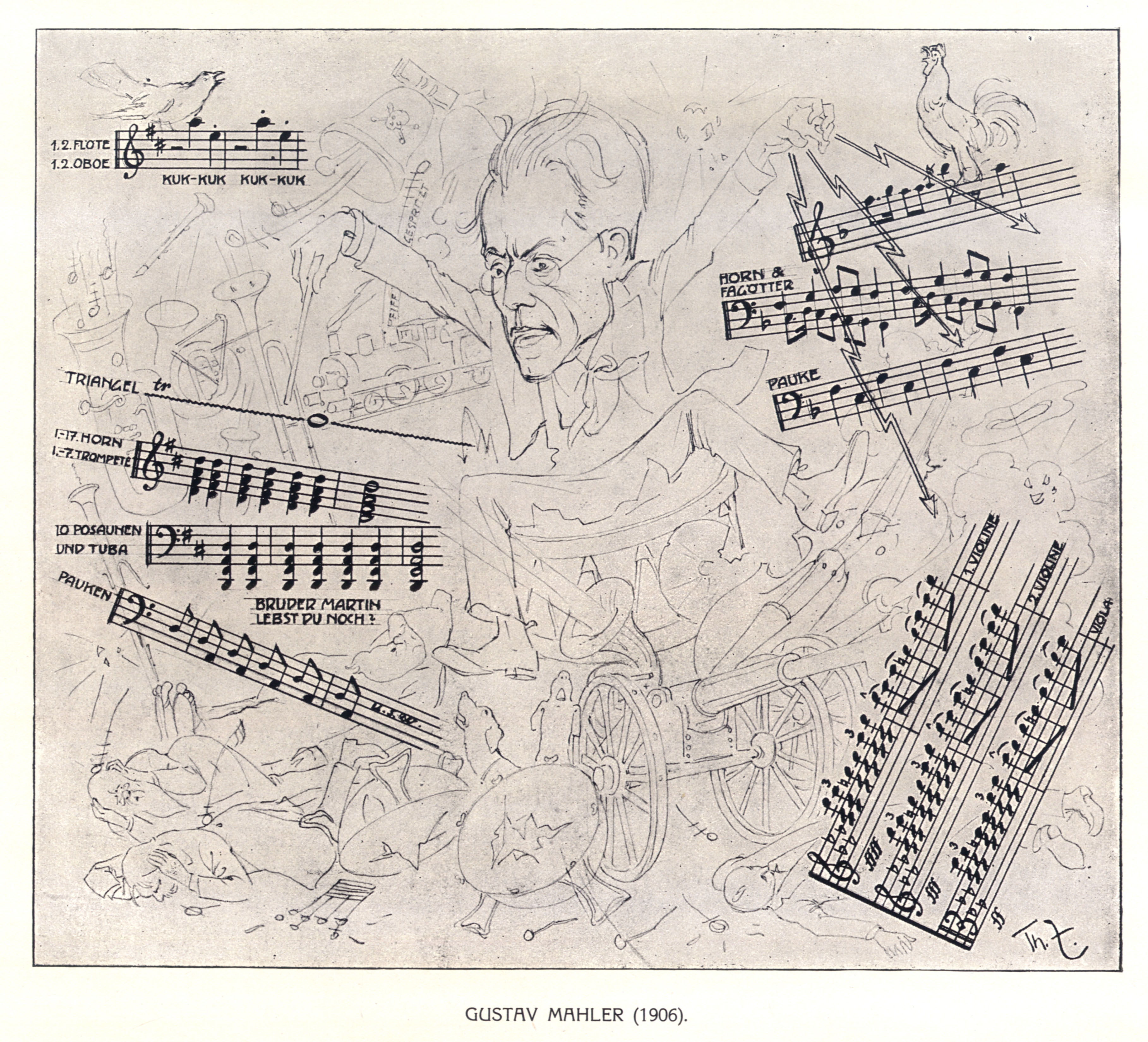 Zasches Zeichnung für die Karikatur, die erstmals in Illustrated Vienna Special Edition 25 November 1900 veröffentlicht wurde.